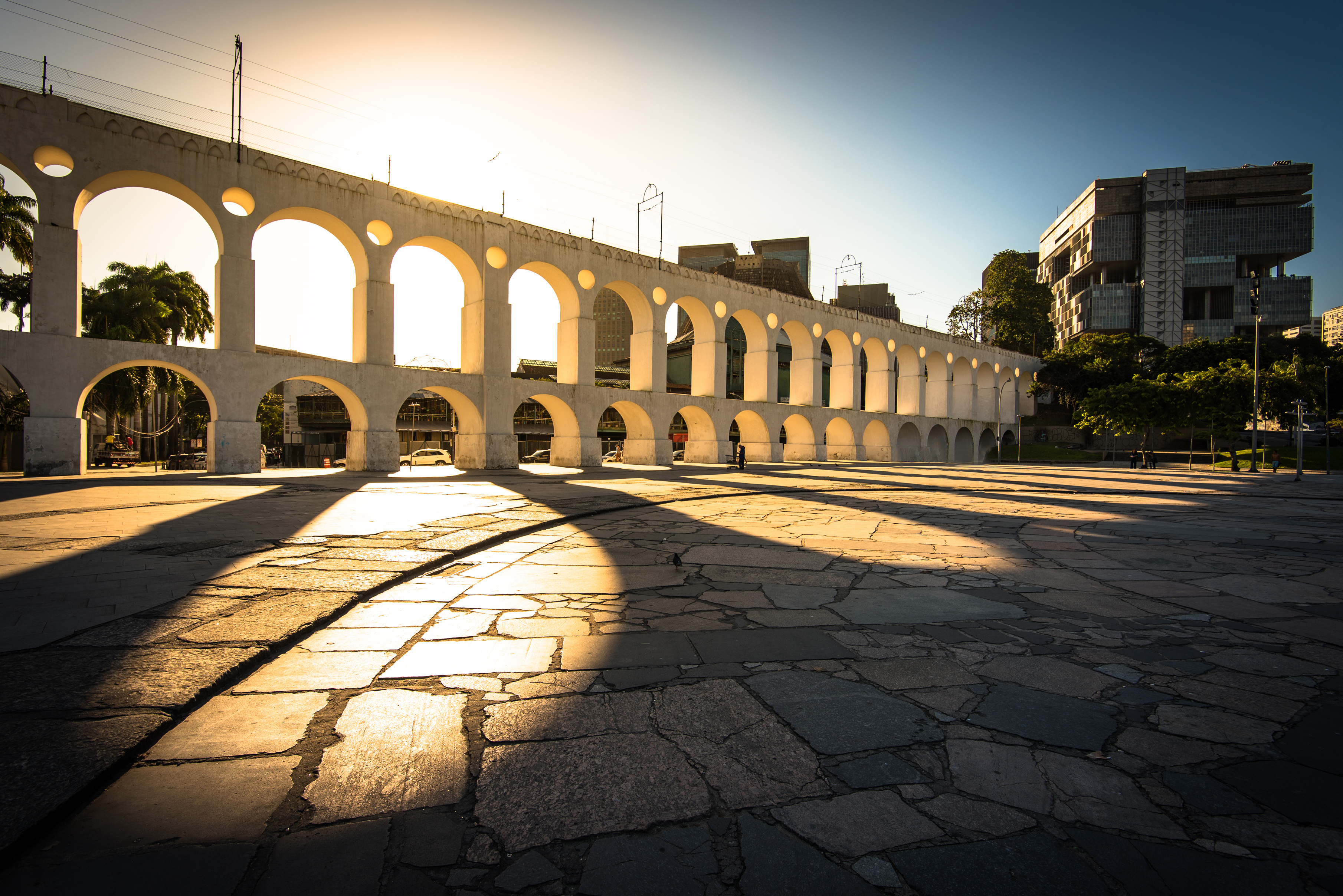 Cultural property Carioca Aqueduct, Rio de Janeiro, Brazil Q1579892, P727: iPatrimônio ID: rio-de-janeiro-arcos-da-lapa, HPIP ID: 844, Inventário dos Monumentos RJ ID: 107